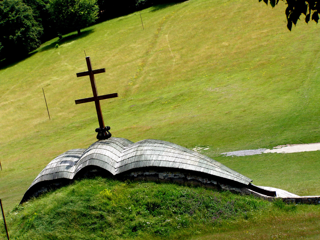 A Hármasoltár Csíksomlyón, a pünkösdi búcsú színhelye.